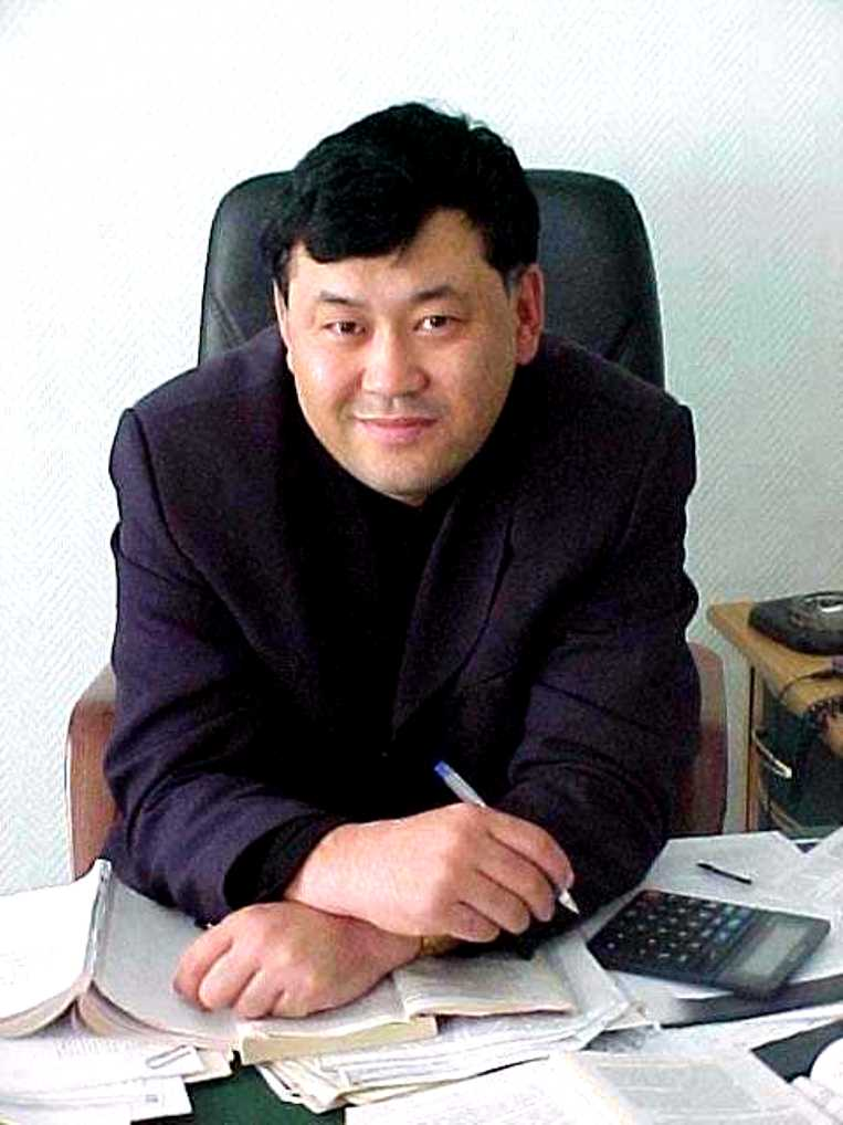 Дулатбеков Нурлан Орынбасарович